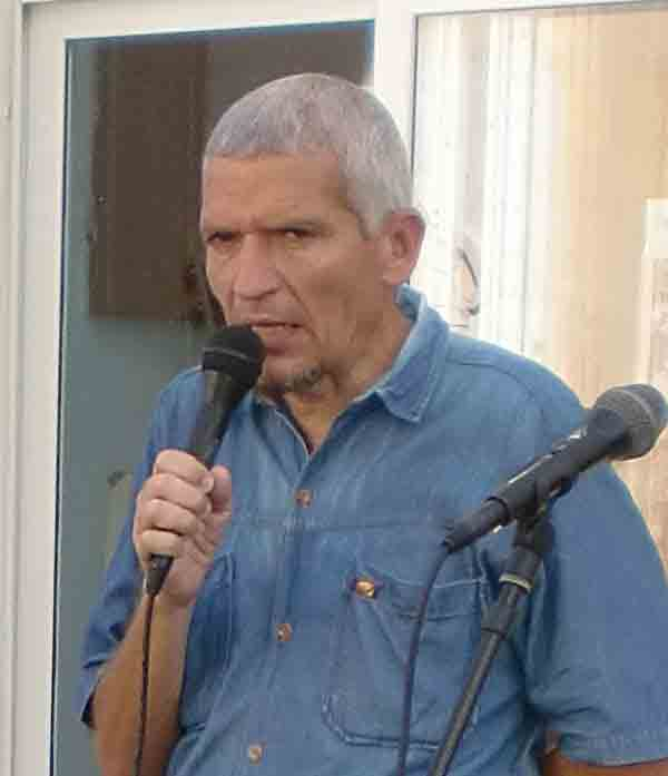 Abel Hernández Muñoz, escritor cubano